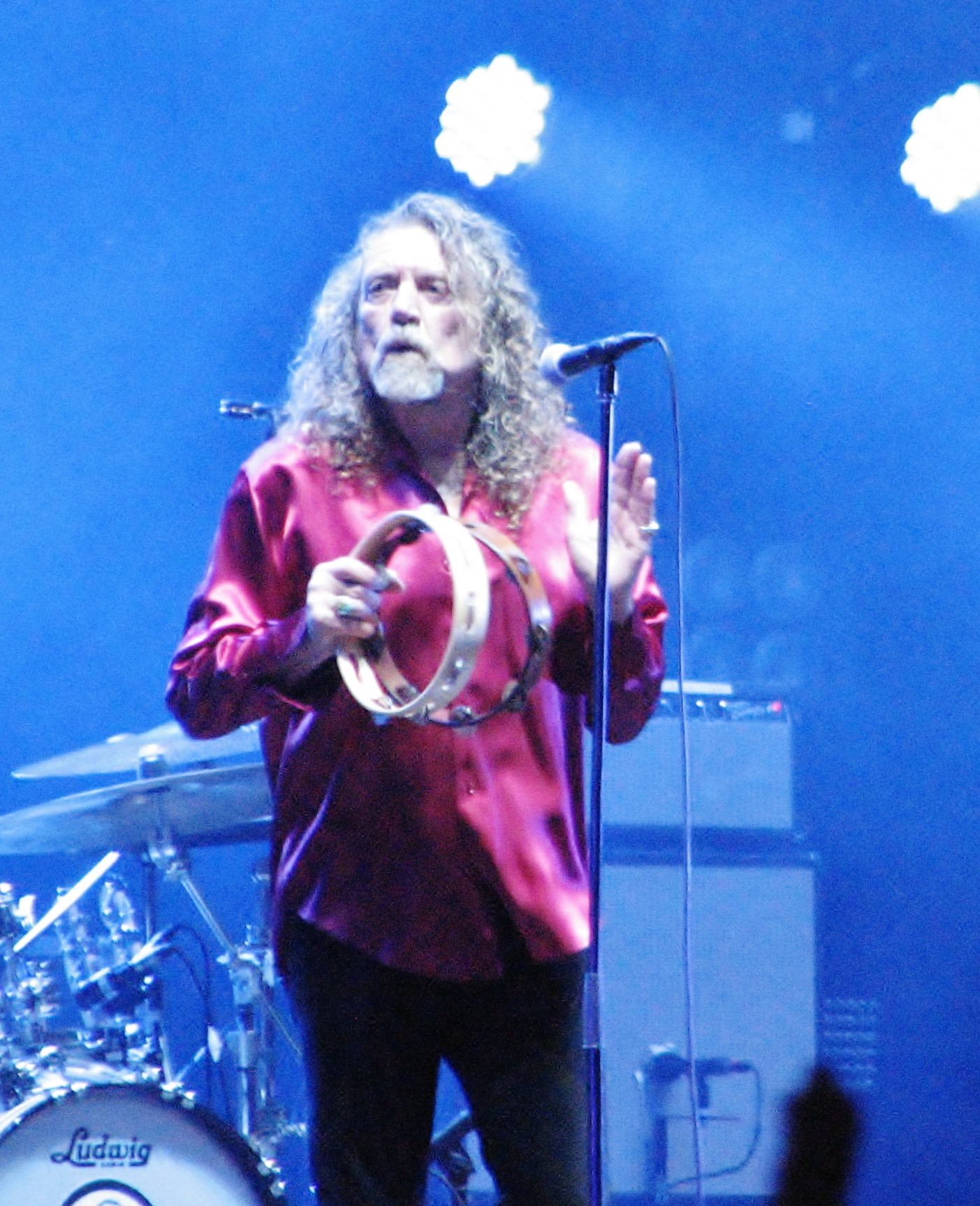 Robert Plant Positivuse pealaval